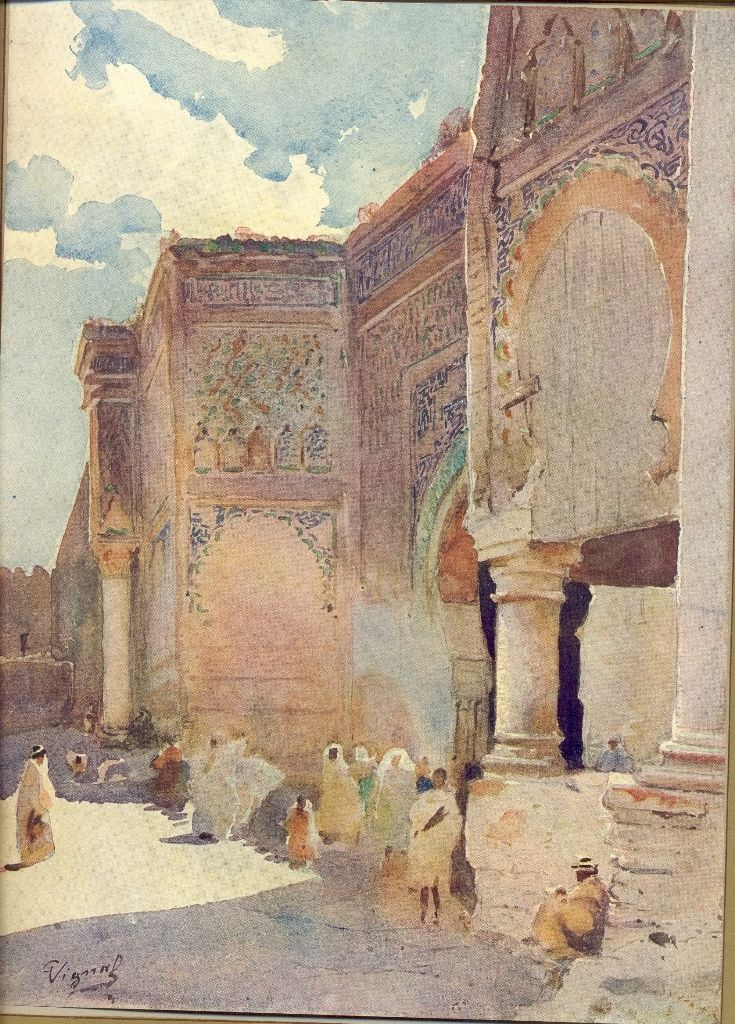 Pierre Vignal (1855-1925): La Porte du renégat à Meknès (Maroc), en 1914.